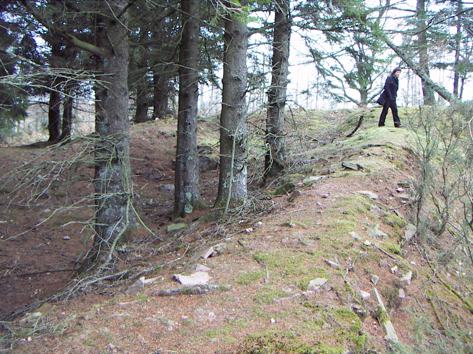 Trenchers and parapets made by republicans in Spanish Civil War.